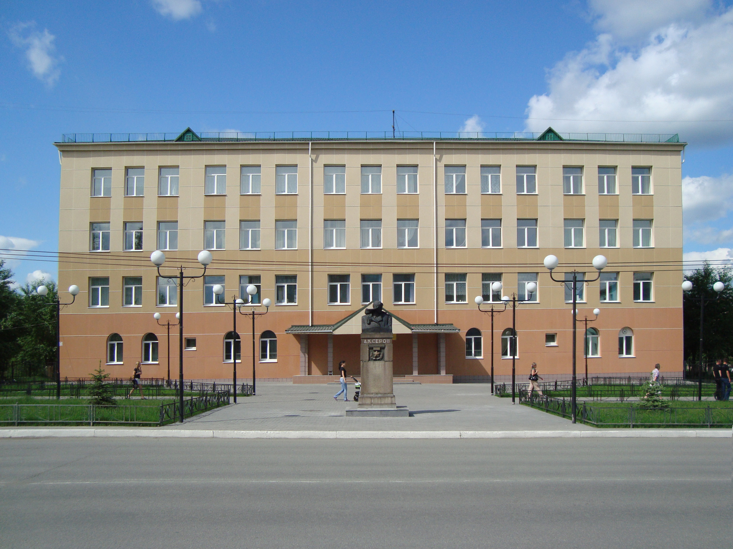 Школа № 20 города Серова